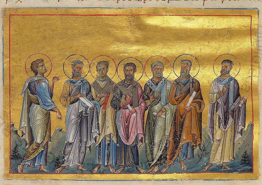 Миниатюра из Минология Василия II.